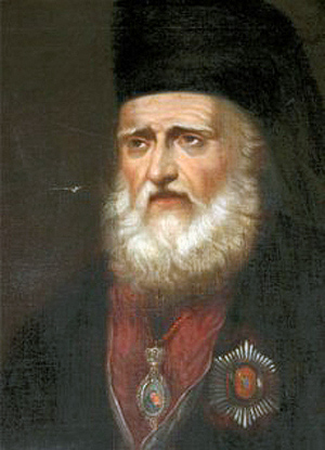 3 сентября 1715 года родился Евгений (Булгарис), архиепископ Славянский